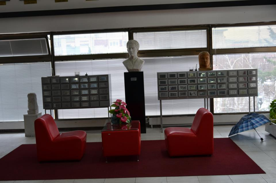 Билбиотека